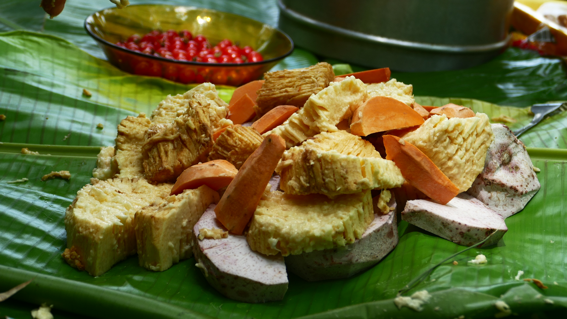 Cette photo à été prise dans la Tribu de Tiéti à Poindimié en Nouvelle-Calédonie. Le bougna est un plat contenant des tubercules (taro, igname, manioc, patate douce ... ) ainsi que du lait de noix de coco, les bougna peuvent être accompagné de crevette, poulet, cerf. Ils sont le plus souvent cuits dans un feu de bois sous des cailloux chauffés. La tribu de Tiéti est une des plus grande tribu du village de Poindimié. Elle est située en province nord de la Nouvelle-Calédonie sur la côte est entre la commune de Ponerihouen et Touho.